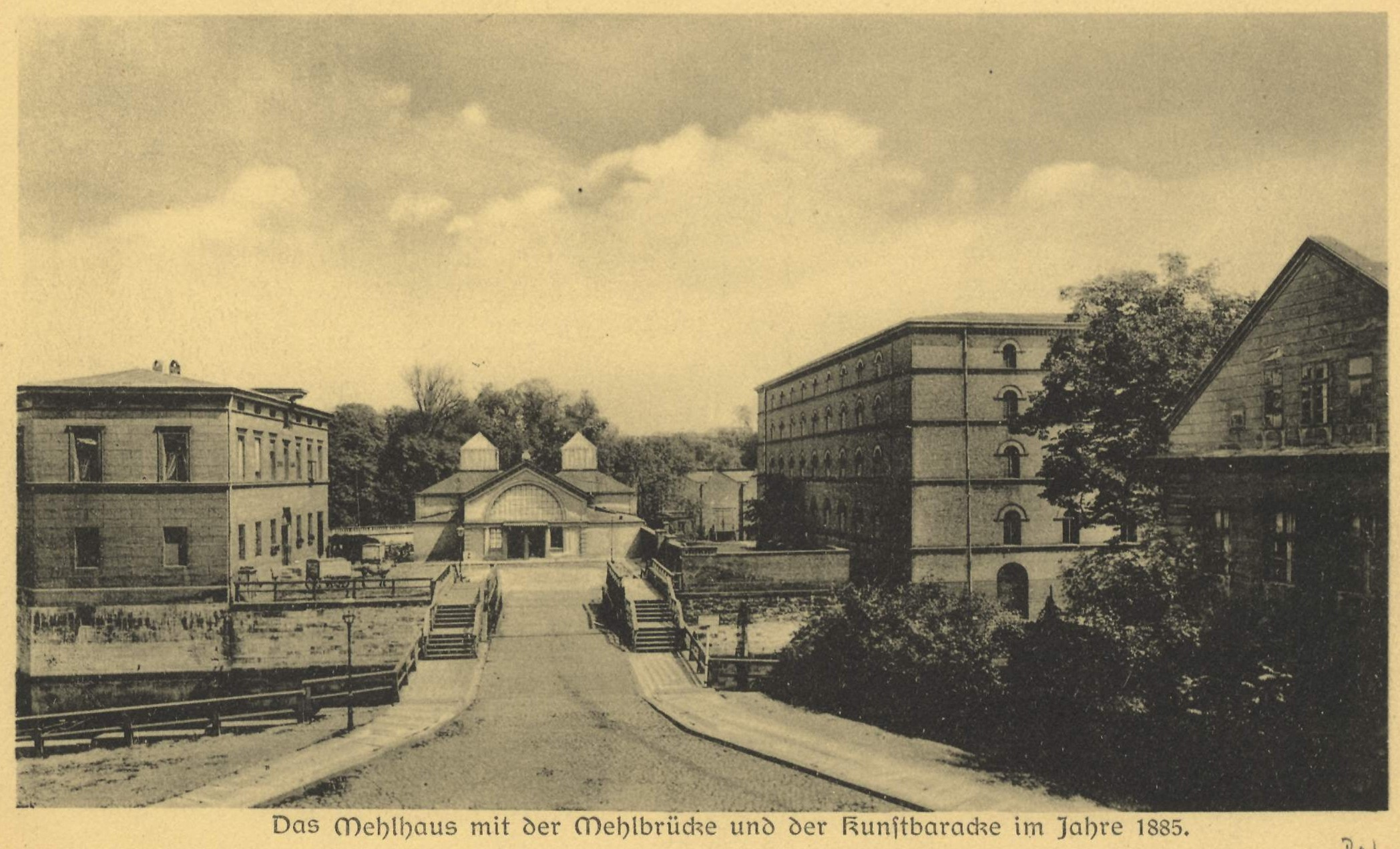 Mehlbrücke, spätere Monbijoubrücke